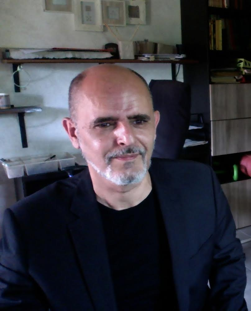 Andrea "Casty" Castellan